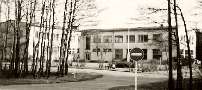 Messe für Offiziere im Camp Astrid im Propsteier Wald 1969